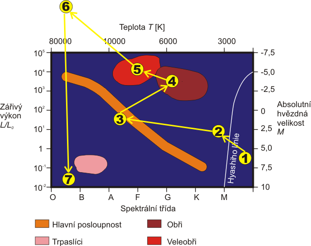 Hertzsprungův-Russellův diagram: vývoj hvězdy o hmotnosti 10 MS